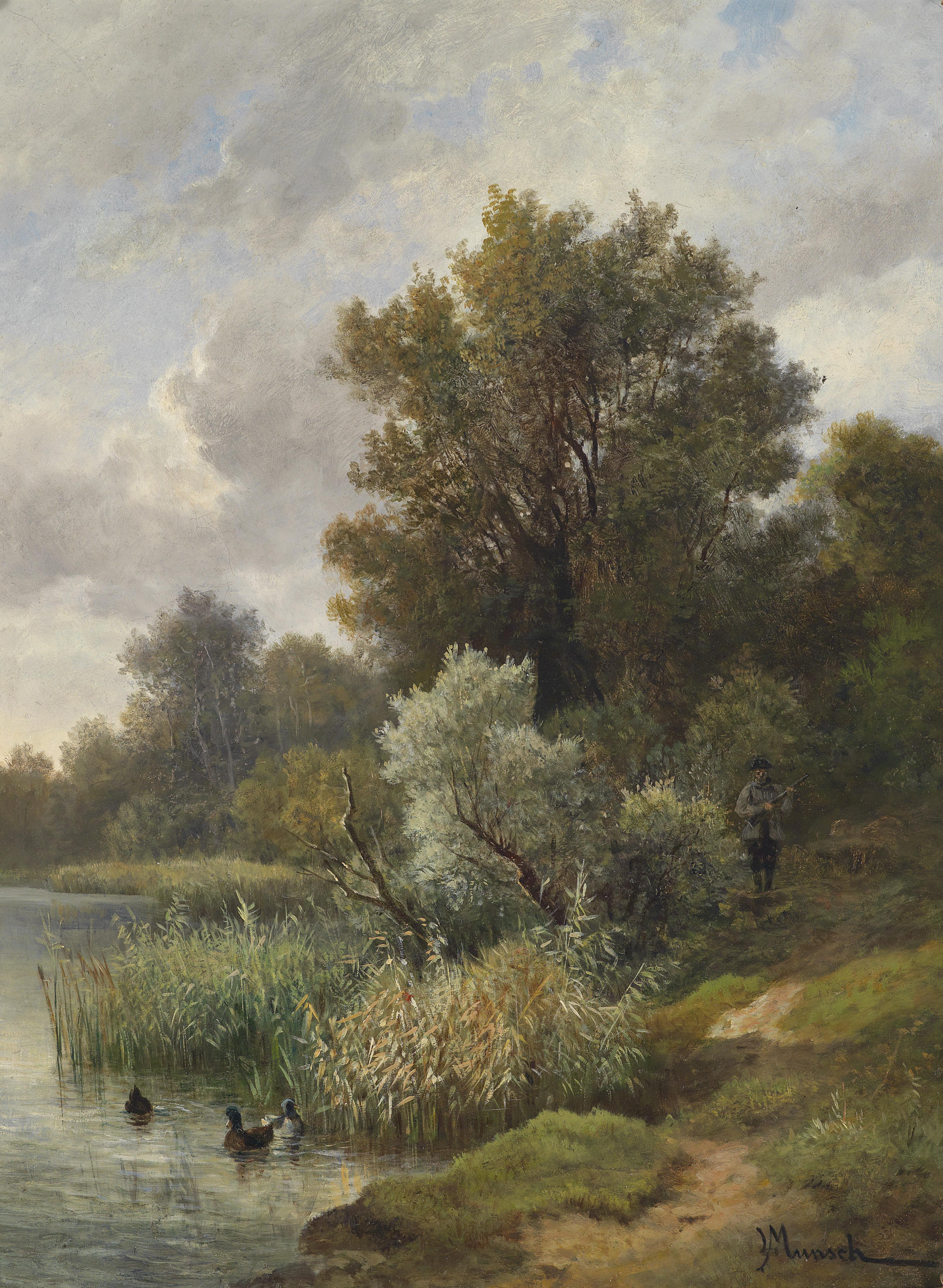 "Praterpartie", rückseitig alt betitelt, bezeichnet, signiert L. Munsch, Öl auf Leinwand, 46 x 34 cm